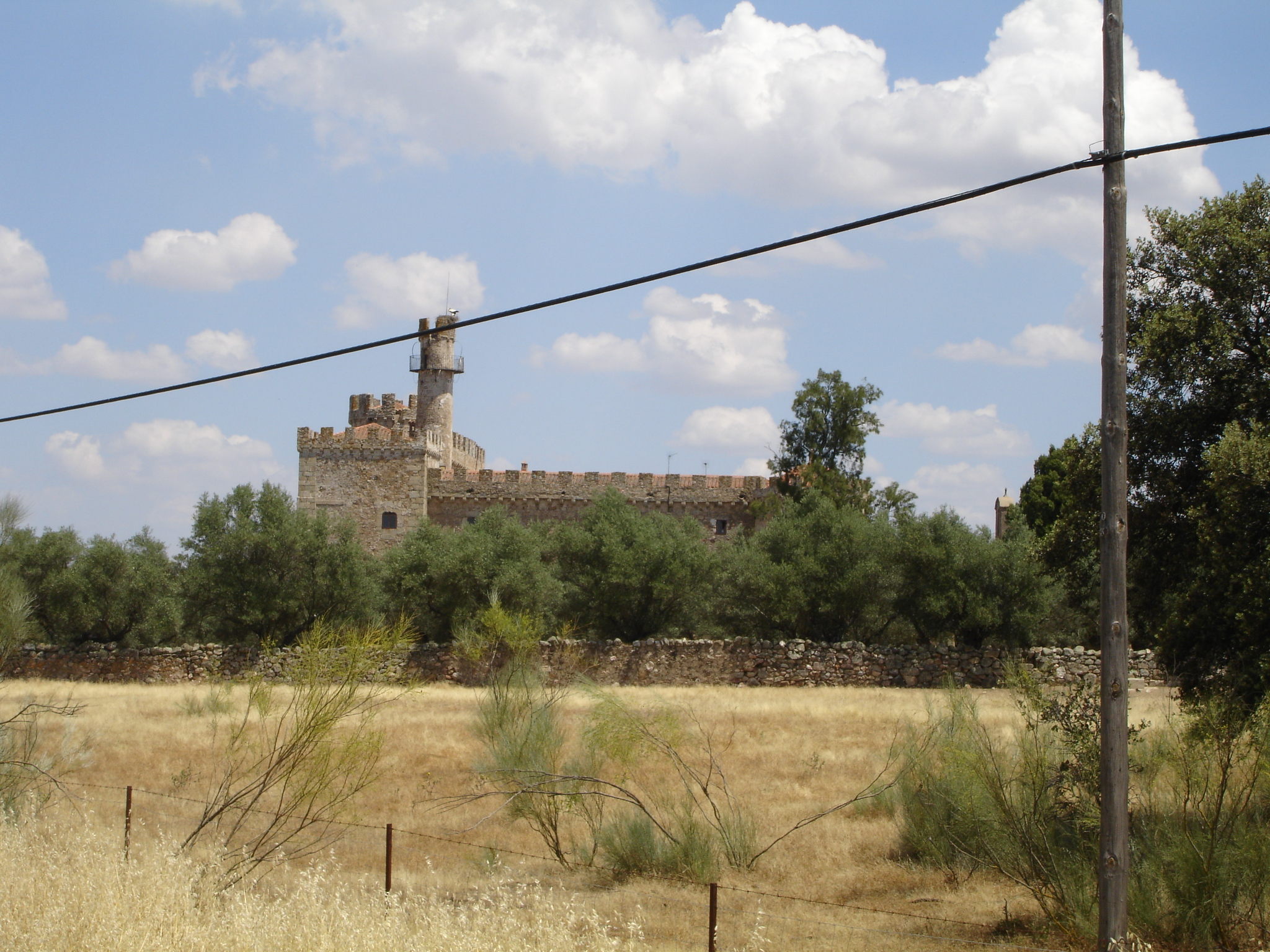 Castillo de las Arguijuelas de Arriba (Cáceres, España)